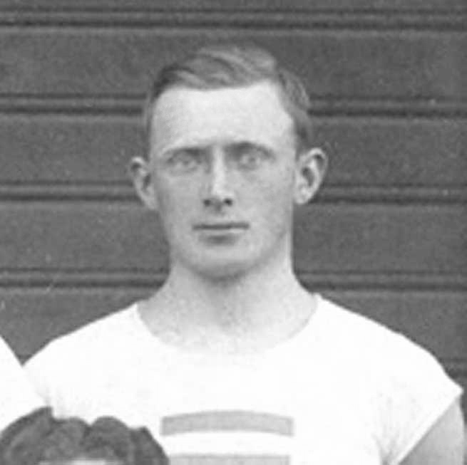 Leif Sörvik